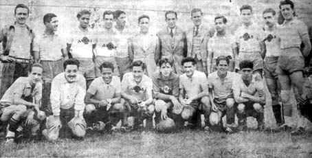 Aucas Campeón de Pichincha Invicto 1945